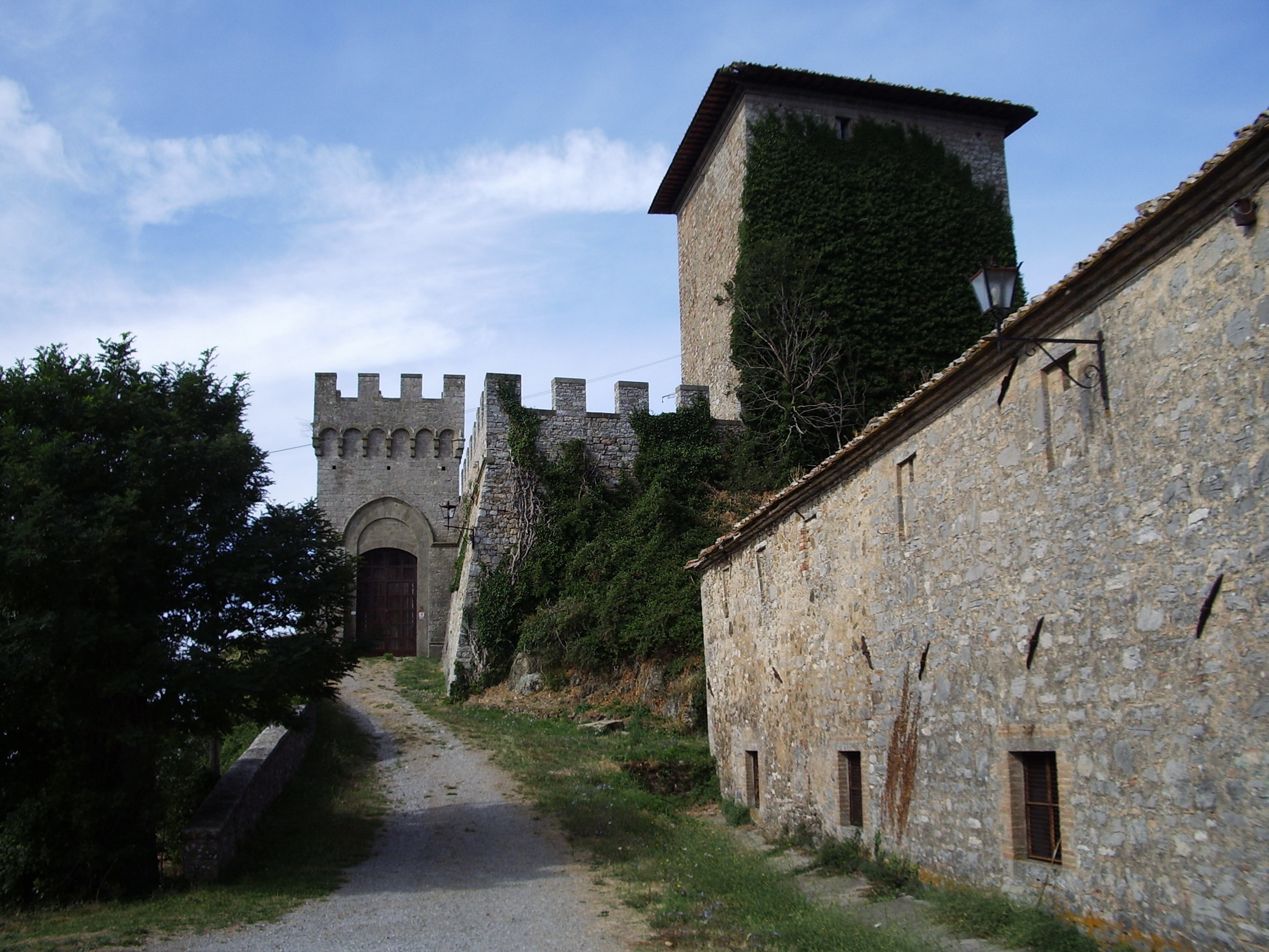 descrizione: Veduta del Castello di Triana nei dintorni di Roccalbegna (GR) lavoro personale di Vinattieri Matteo (27/01/2007 con foto scattata nell'agosto 2006) che lascia in pubblico dominio